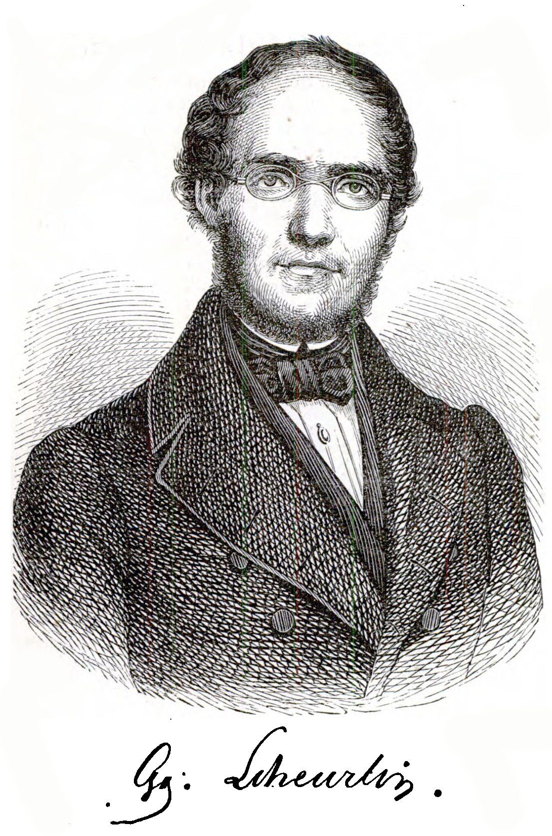 Georg Scheurlin. In: Geschichte der deutschen Literatur: Mit ausgewählten Stücken aus den Werken der vorzüglichsten Schriftsteller. Band 4, Leipzig: Teubner, 1872. S. 269